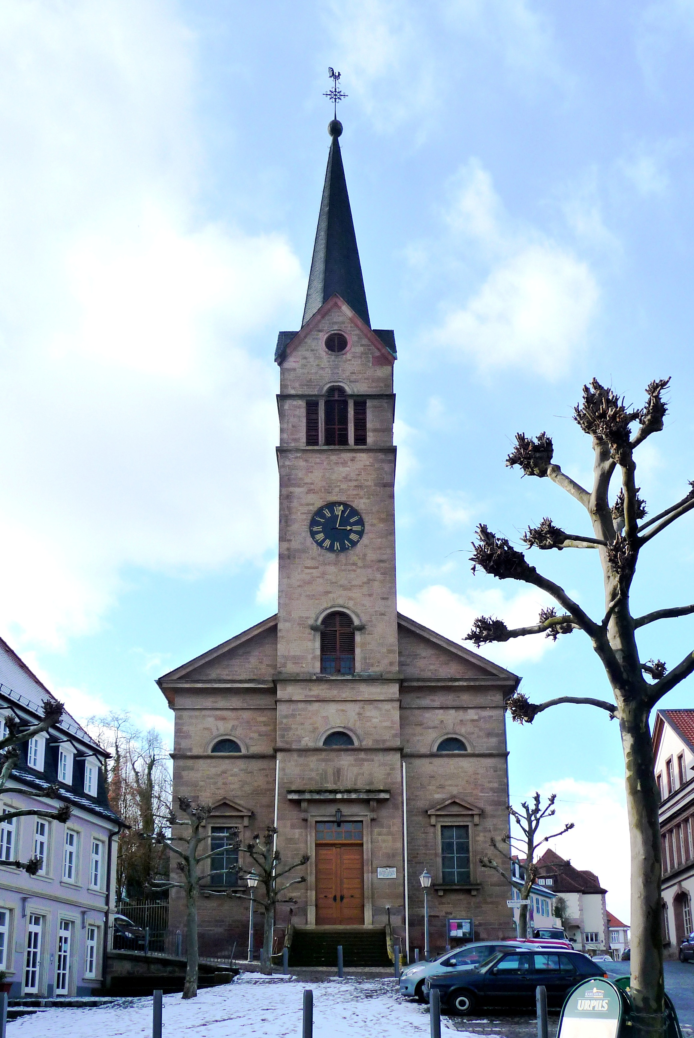 Evangelische Stadtkirche in Kusel (Kreis Kusel, Deutschland)